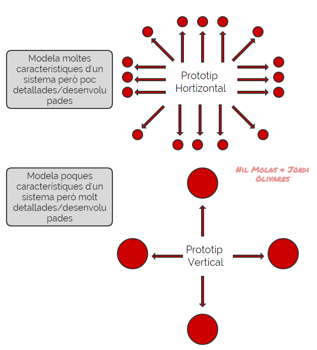 Imatge que mostra les diferències entre els difrents prototips